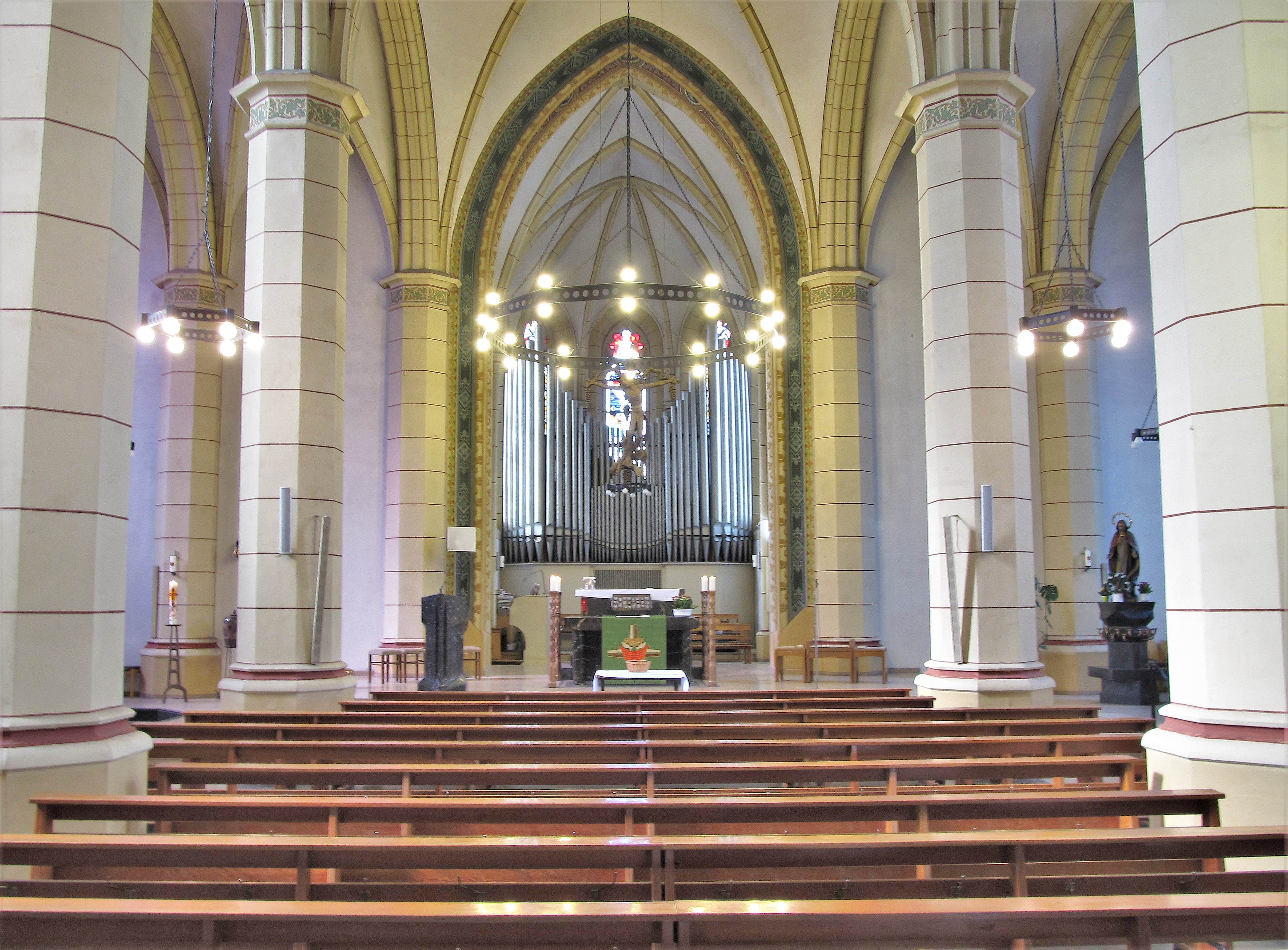 Blick ins Innere der katholischen Pfarrkirche St. Eligius in Burbach, einem Stadtteil der saarländischen Landeshauptstadt Saarbrücken